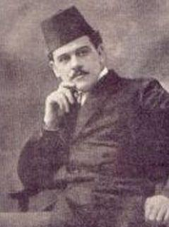 Osman Djikic, pesnik